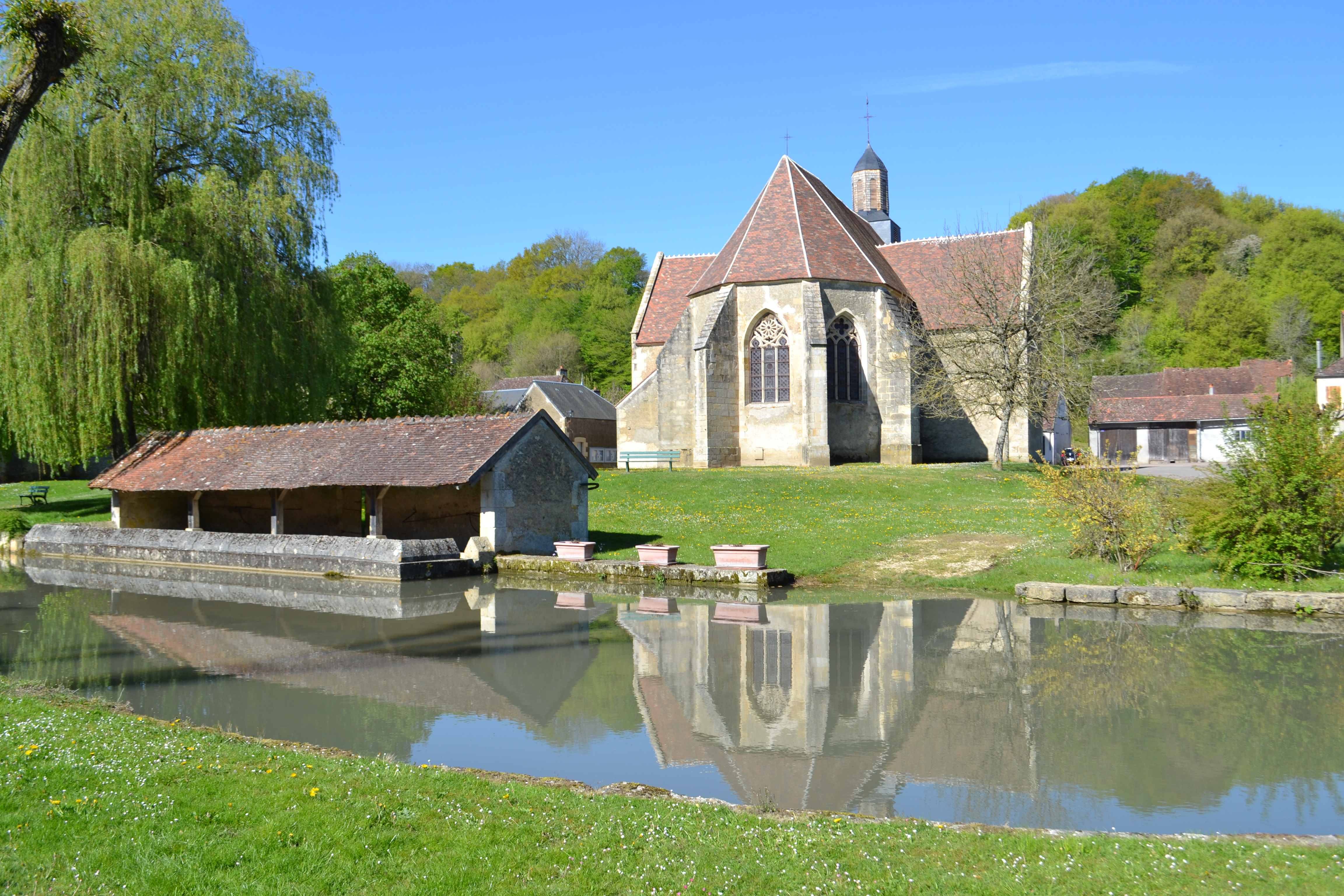 Vue du lavoir et de l'église de Cessy-les-Bois (Nièvre).